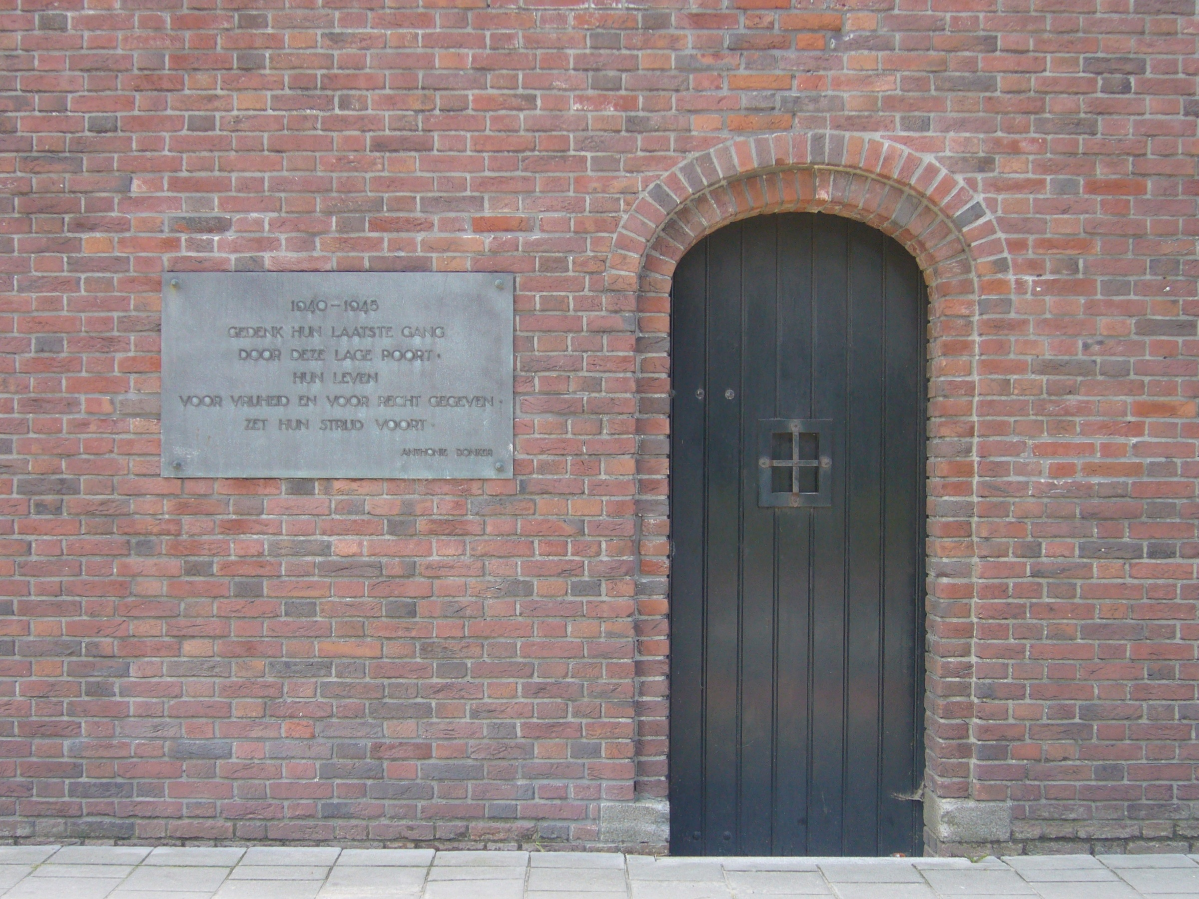 Oranjehotel in Scheveningen, zijdeur 'het Poortje' waardoor gevangenen naar buiten gingen om op de Waalsdorpervlakte gefusilleerd te worden.